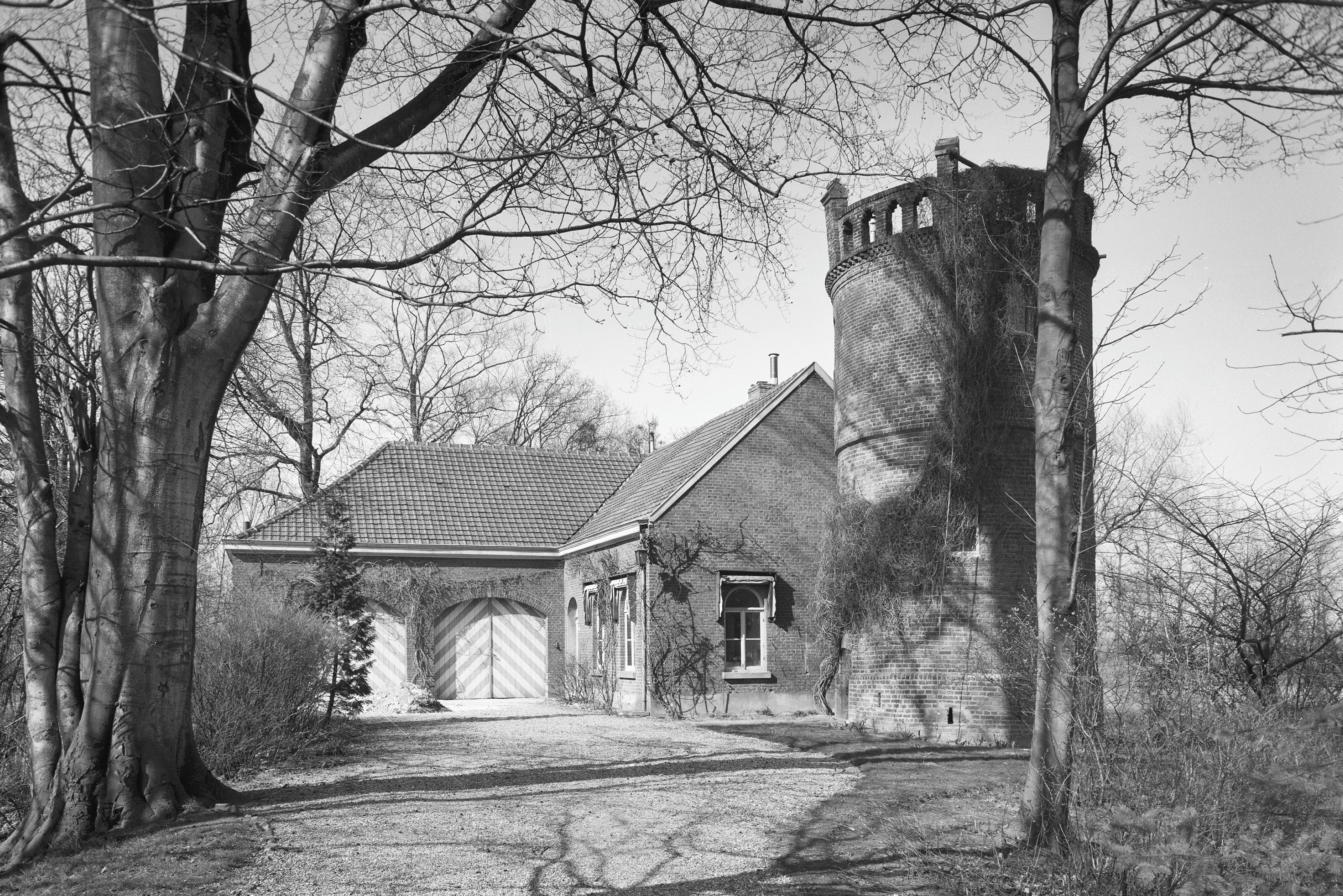 Kasteel Freymerson, bijgebouw